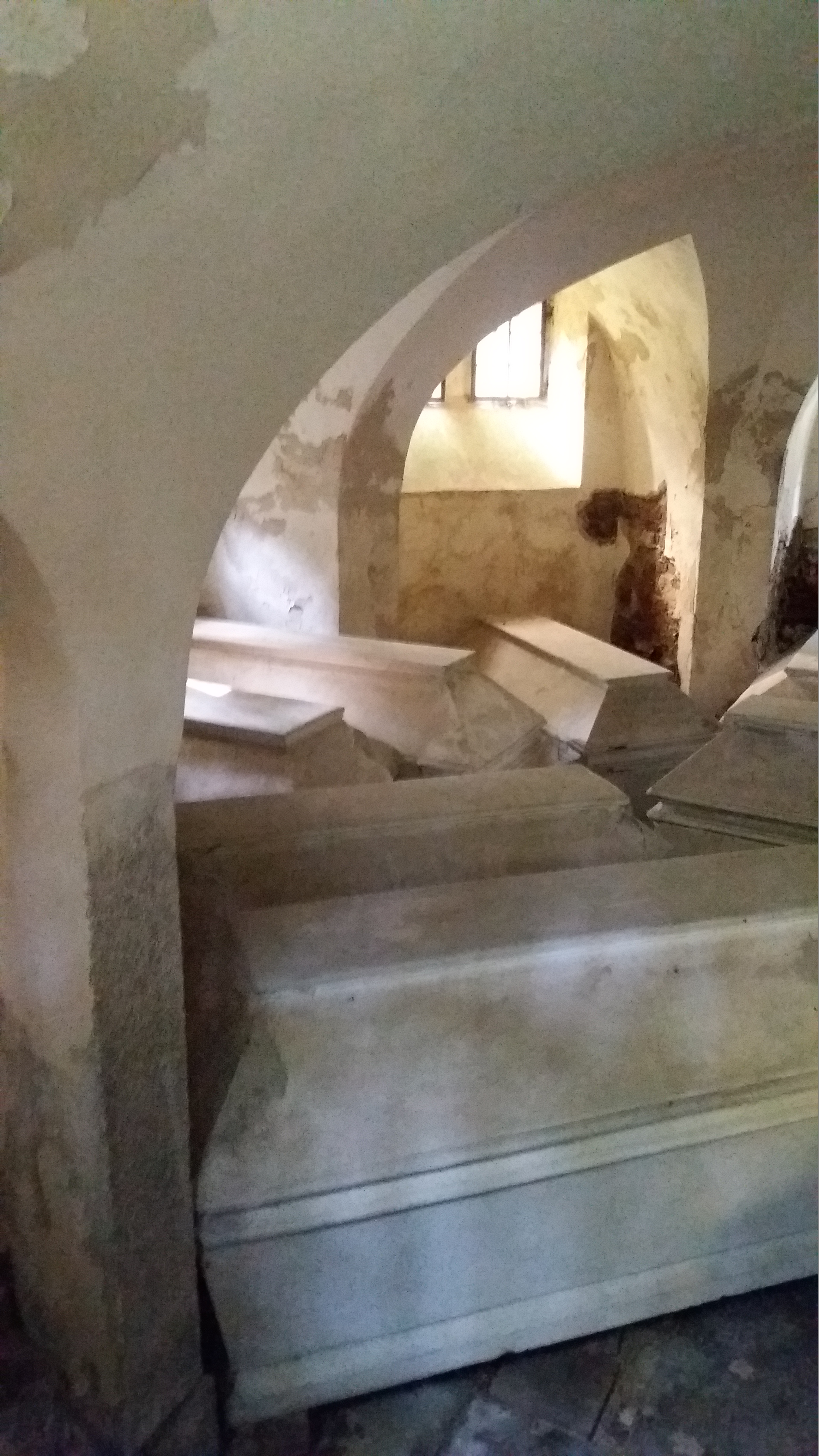 Sarkophag Paul Yorck von Wartenburgs in der Gruft des Mausoleums der Grafen Yorck im Schloßpark von Klein Oels